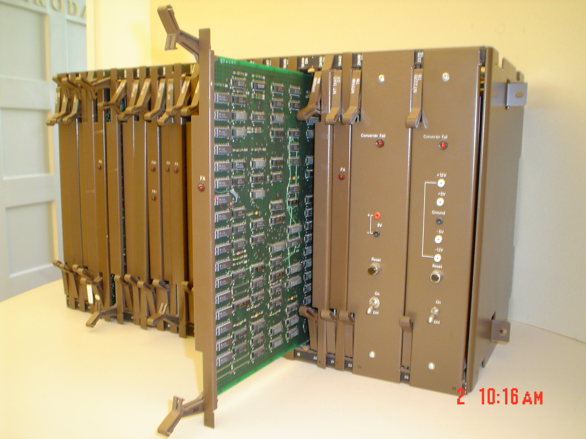 Digitális telefonközpont alkatrésze (Telefónia múzeum, Budapest)